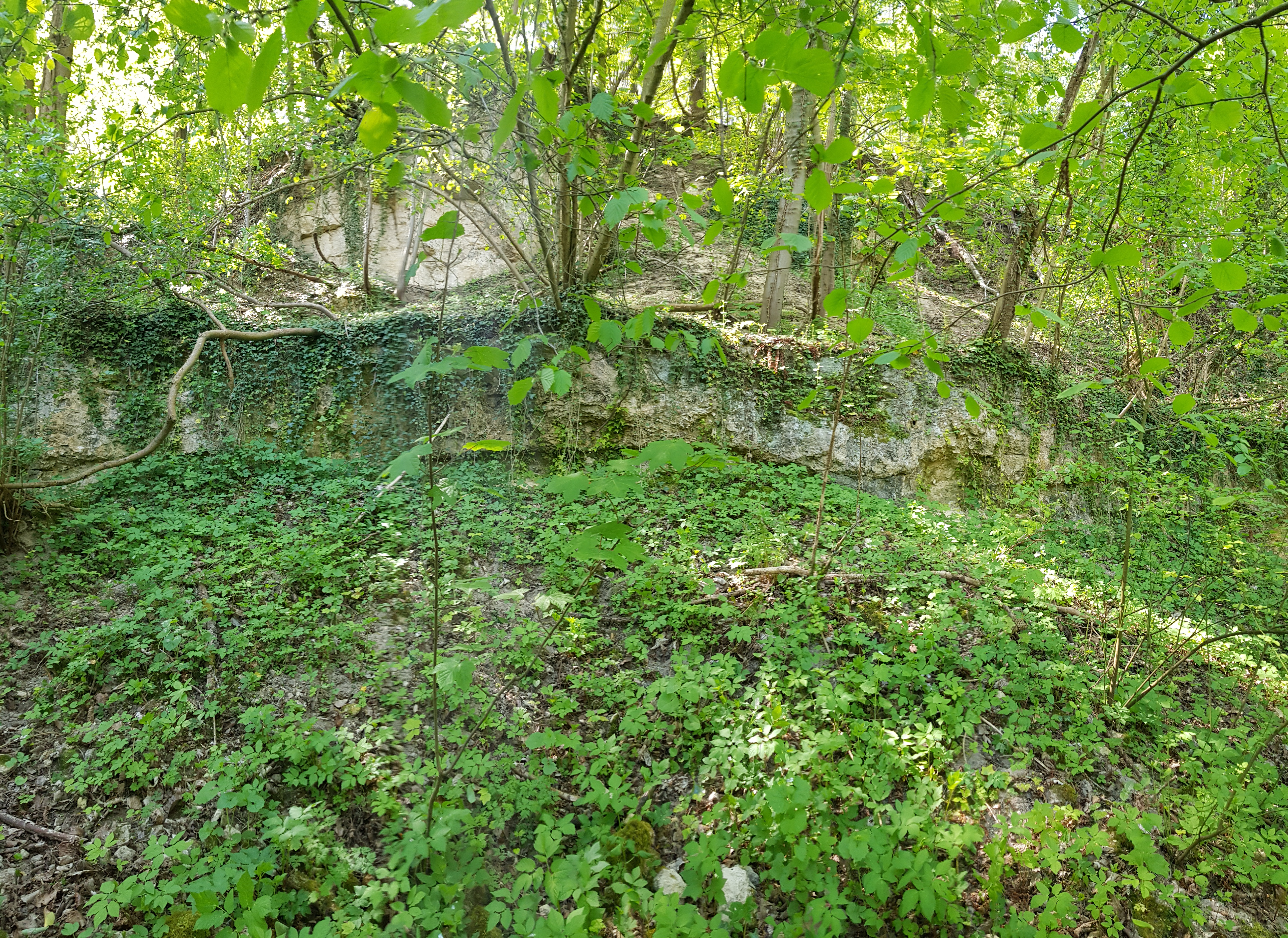 Groeve het Paradijsbergske II, Geulhem, Nederland